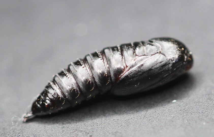 Puppe von Ptycholoma lecheana am 16. Mai 2020